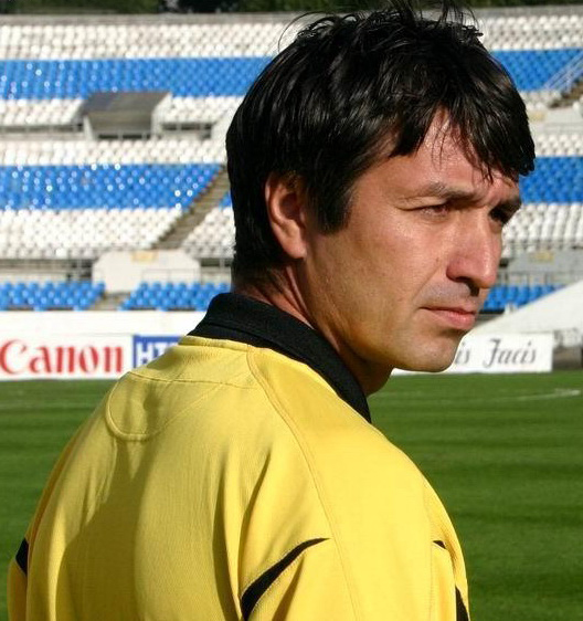 Almir Kayumov